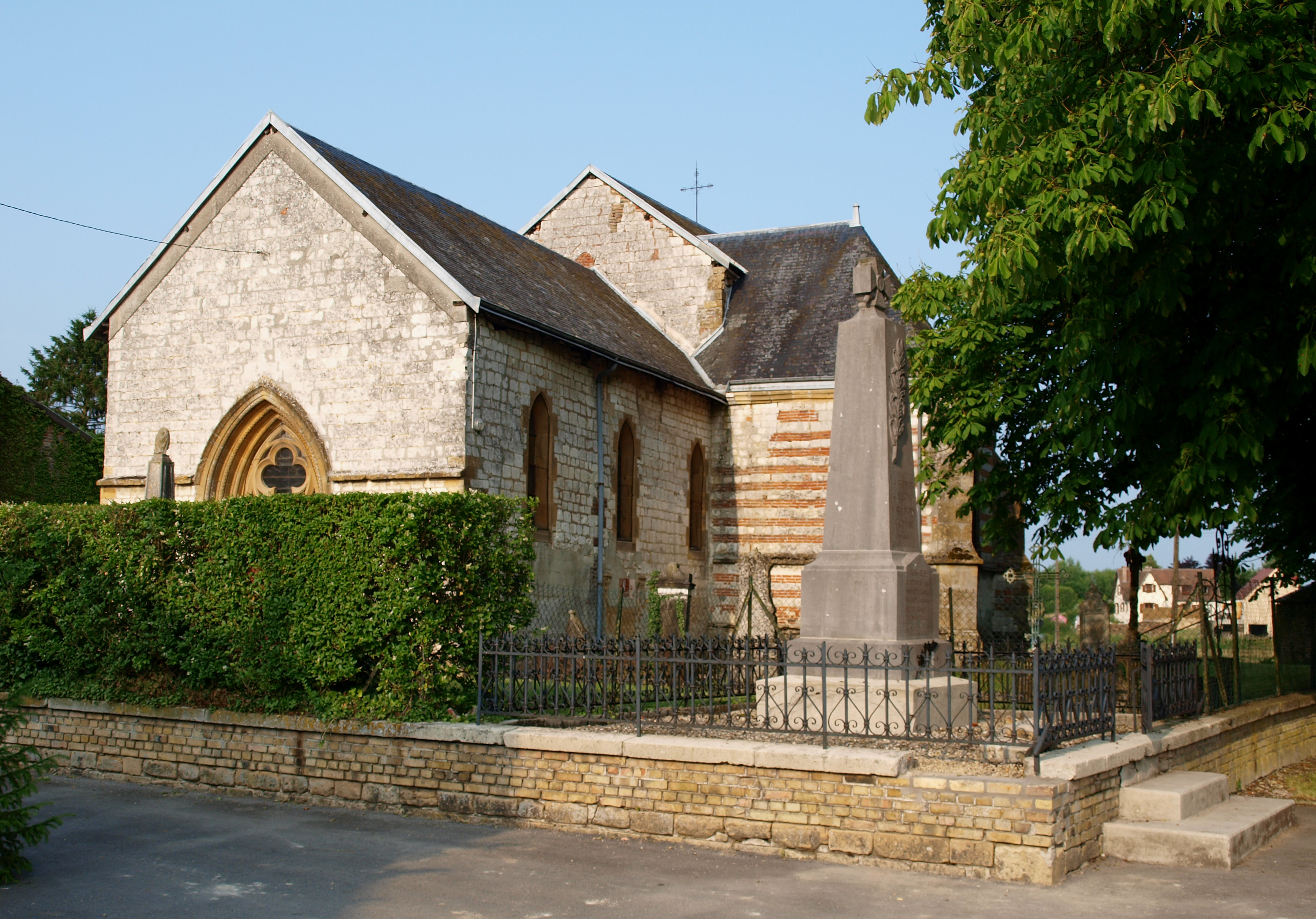 Sugny (Ardennes, France) , église